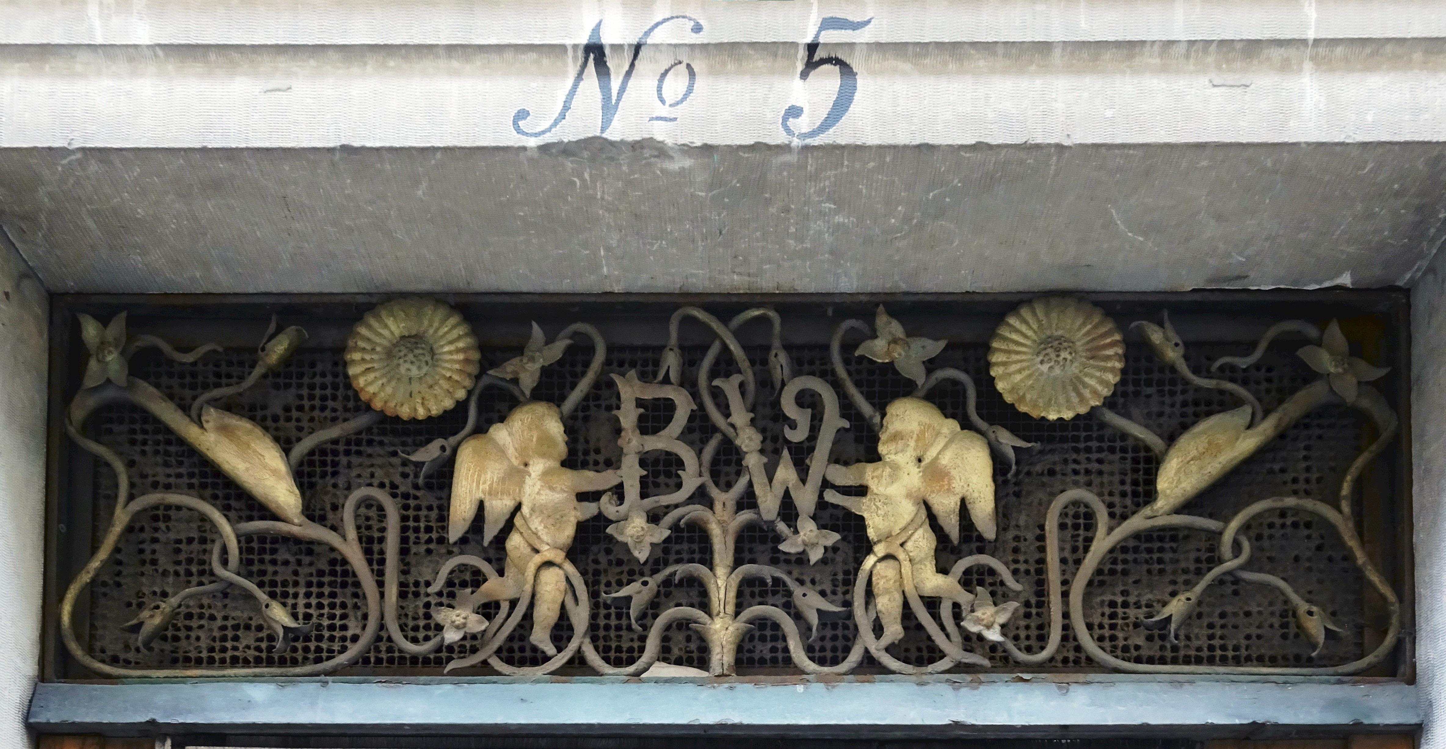 Bacci Wapen, Järntorgsgatan 5, portöverdel "B W"